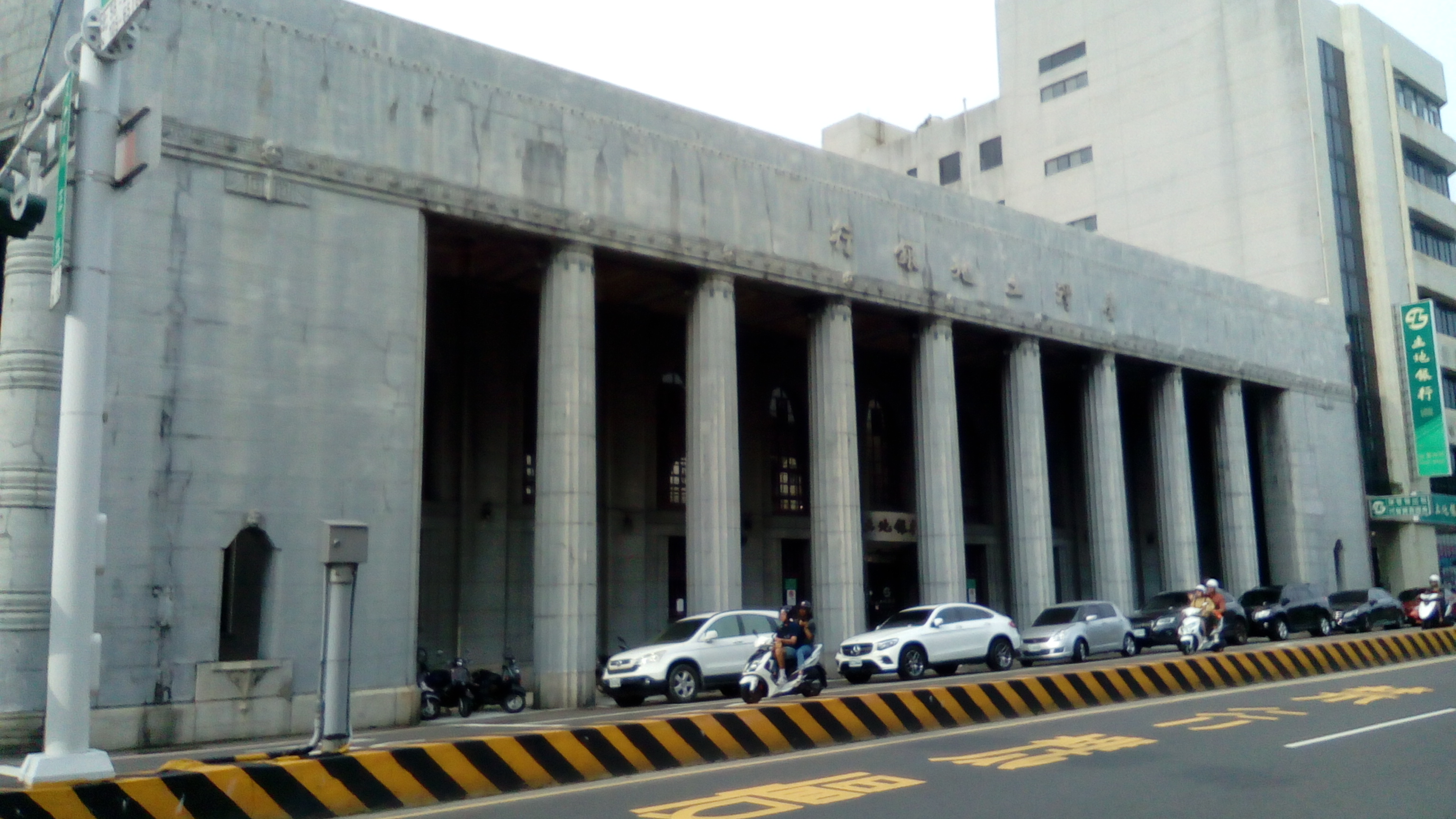 臺灣土地銀行臺南分行。